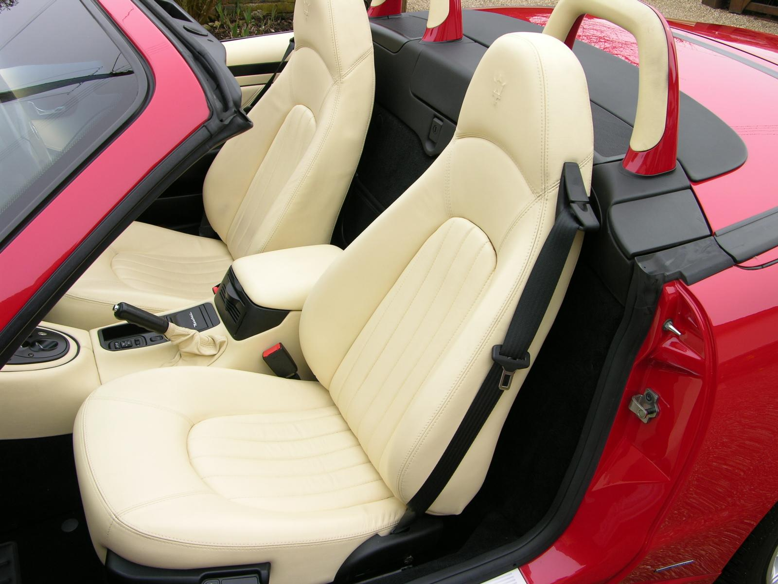 Maserati 4200 Spyder